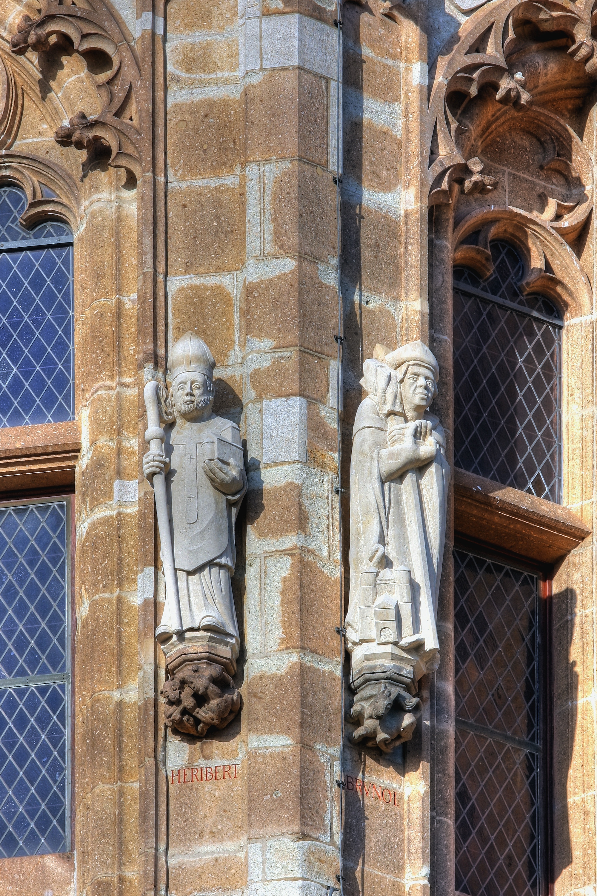 Rathausturm Köln mit den Figuren von: Heribert - Bruno I. Details zu den Statuen: Bildhauer der Heribert-Statue: Friedrich Lindenthal Bildhauer der Bruno-Statue: John-Michael Bachem Details zu den Konsolen: Thema der Konsole unter der Heribert-Statue: „Zwei Hunde und ein Knochen“. Herbert Rausch Thema der Konsole unter der Bruno-Statue: „Esel auf dem Glatteis“. Bildhauer: Herbert Rausch